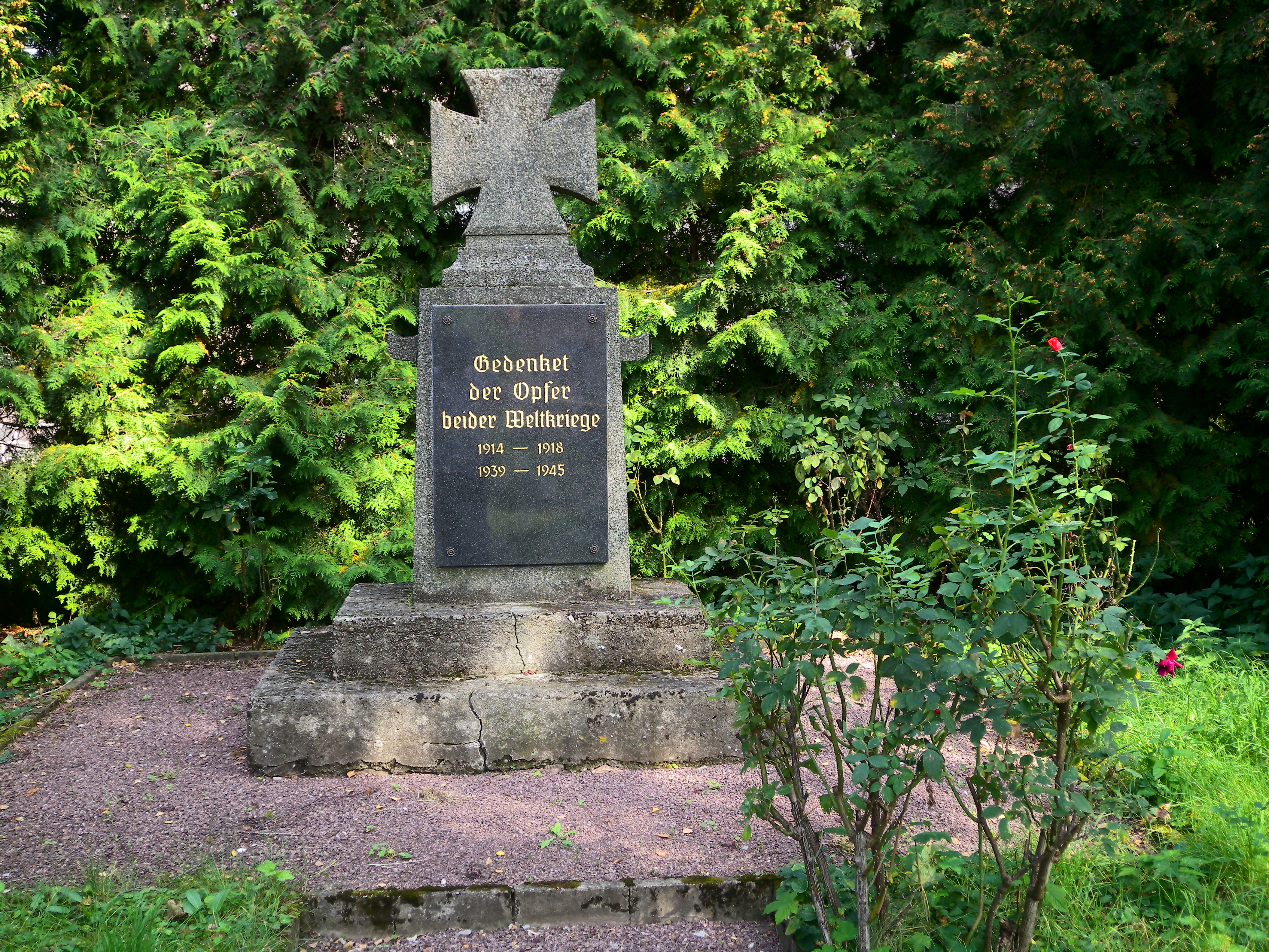 Im Kirchhof von Merzien (früherer Friedhof)